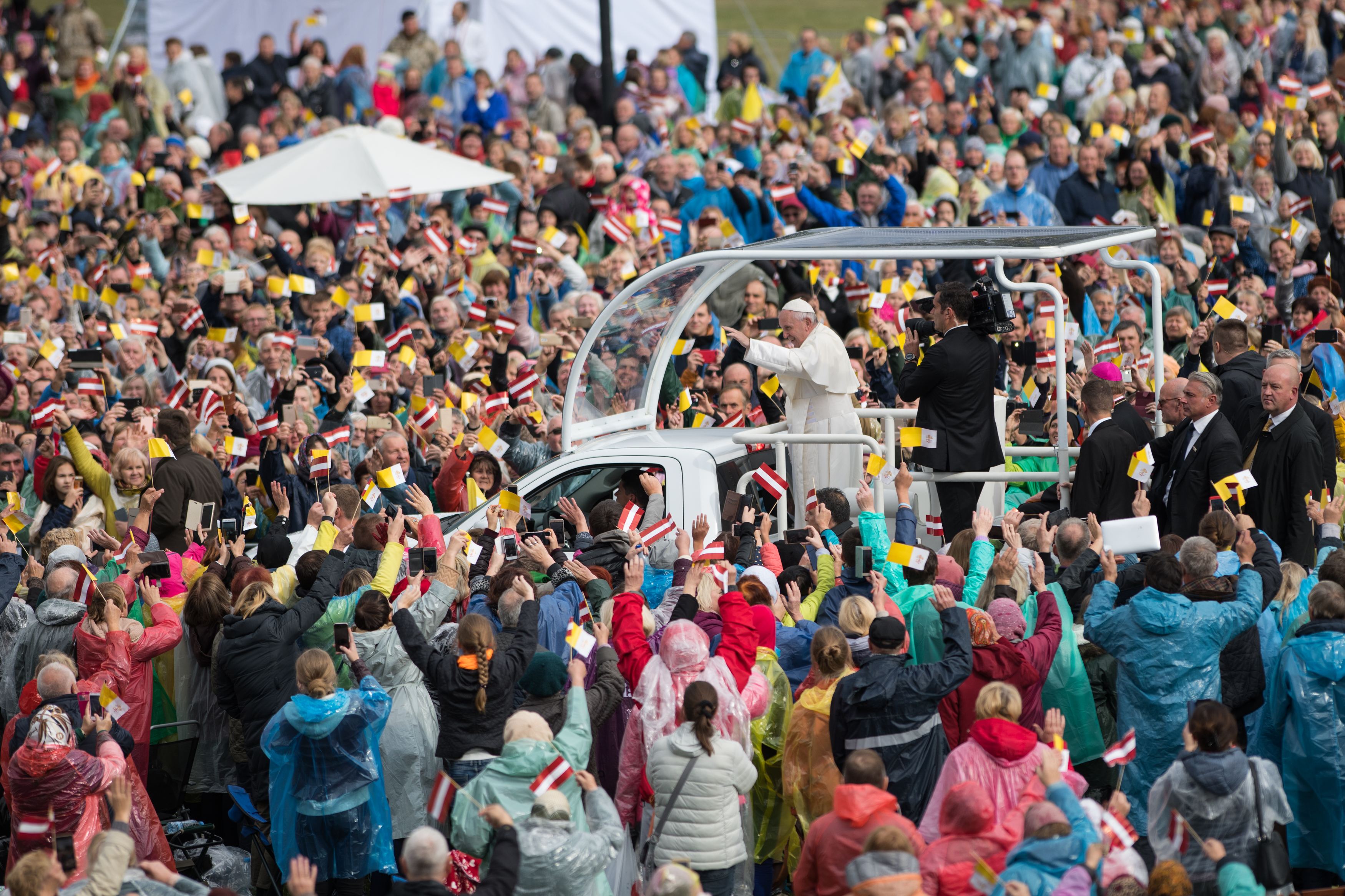 2018.gada 24.septembris. Svētā mise Aglonā. Foto: Ernests Dinka, Saeima Izmantošanas noteikumi: saeima.lv/lv/autortiesibas